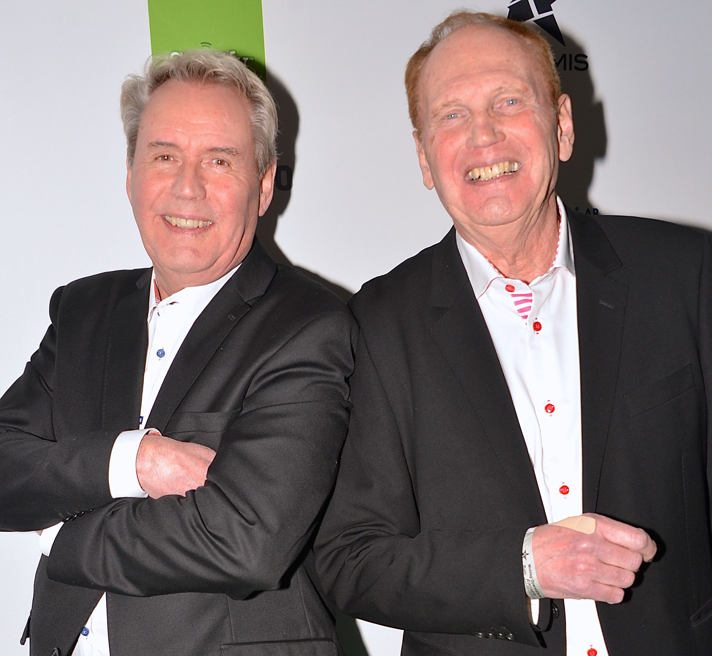 Sten & Stanley på Grammisgalan på Cirkus, Stockholm den 20 februari 2013.